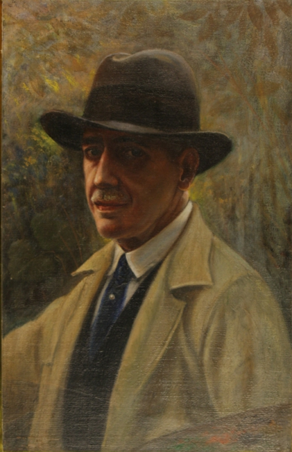 Enrique Lynch Del Solar, pintor. Nació en Quillota, Chile el 15 de diciembre de 1862. Falleció en Santiago el 26 de julio de 1936.